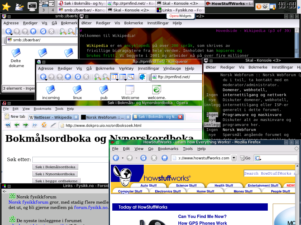 Her vises 5 nettlesere. Blant de grafiske er Konqueror, Opera, Mozilla Firefox samt Links i grafisk modus. De ugrafiske er Lynx og Links. Konqueror viser seg som filbehandler i håndtering av delte mapper på en Windows-maskin via SMB-protokollen, og viser innholdet på en ftp-tjener. Opera viser bruk av faner, men alle de grafiske nettleserne vist her støtter faner. Links og Lynx støtter ikke faner, men det går an å ha faner i terminalvinduet de kjører i. Opera er i versjon 9 beta, og man kan se den har fått «widgets», altså småprogrammer som egentlig er utvidelser av nettleseren. Operativsystem er Mandriva Linux 2006.0, og grafisk skrivebordsmiljø er KDE 3.4.2 med gjennomsiktig vinduspynt.